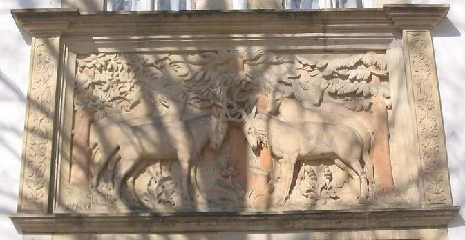 Grunewaldsee, Berlin (Hirschrelief von 1542 über Sandsteinplatte mit historischer Inschrift)